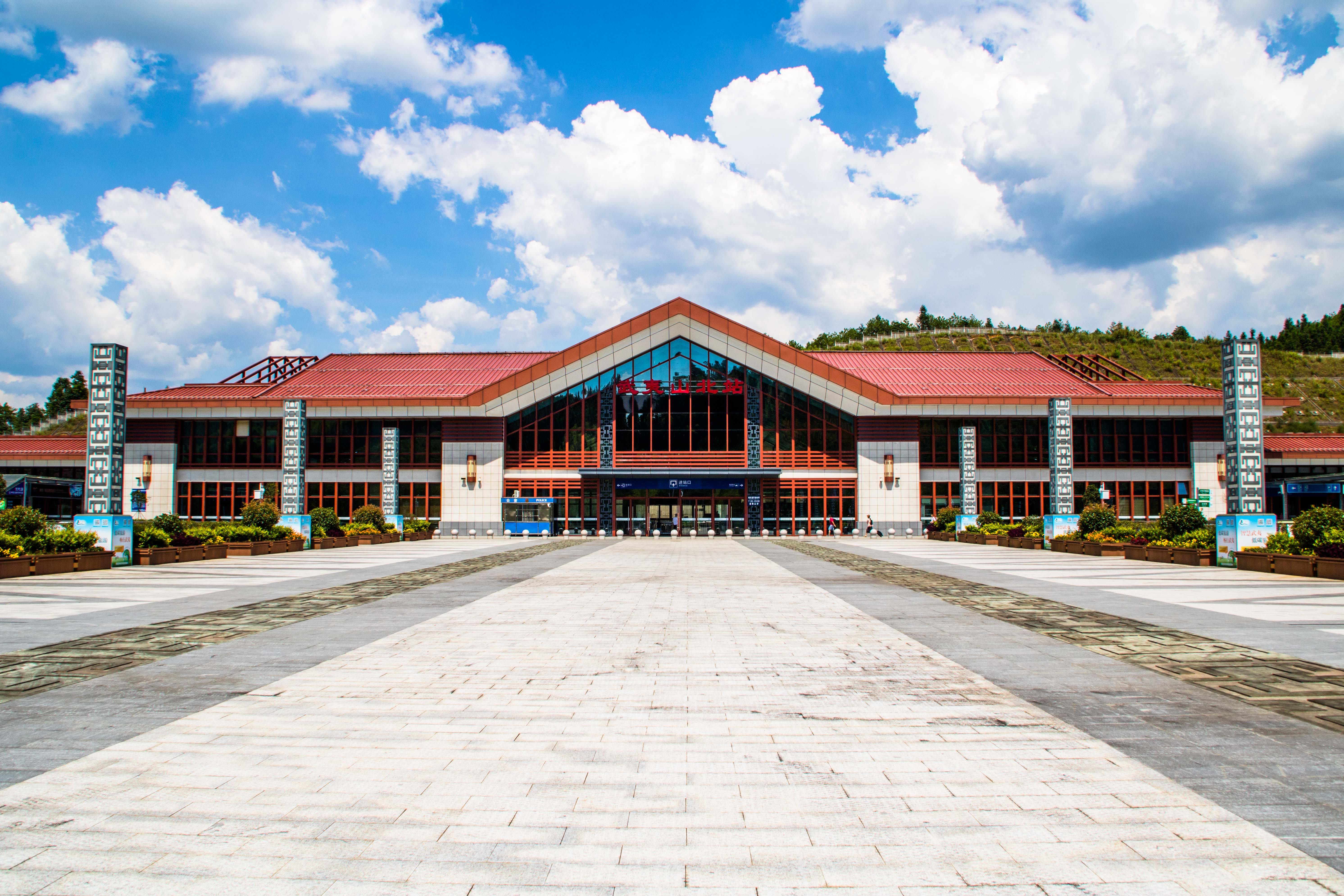 中文（中国大陆）: 武夷山北站站房